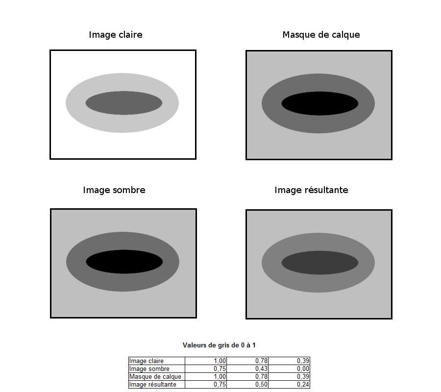 Description, sur un exemple artificiel, du fonctionnement de la technique de mélange numérique (digital blending) utilisable en photographie numérique lorsque la dynamique du capteur est inférieure à la dynamique de la scène.